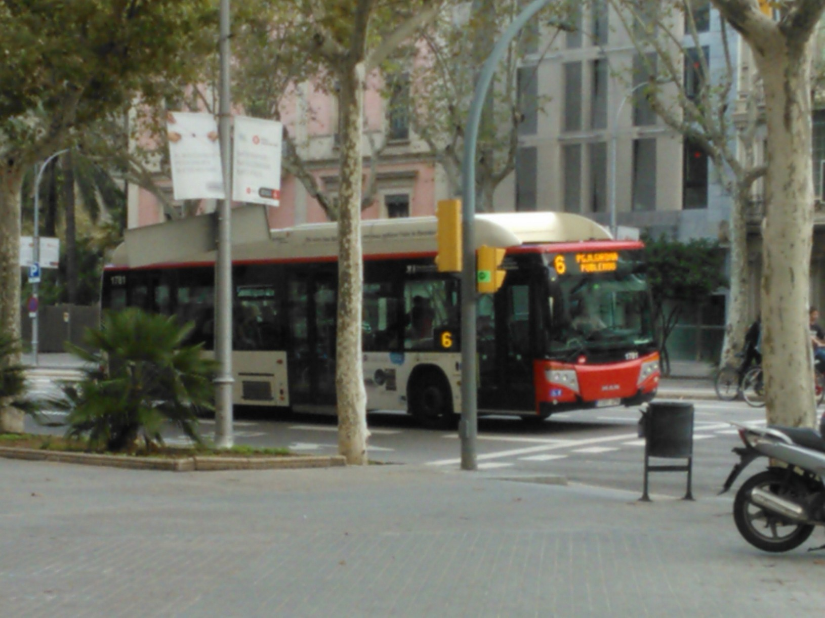 Autobús urbà de Barcelona